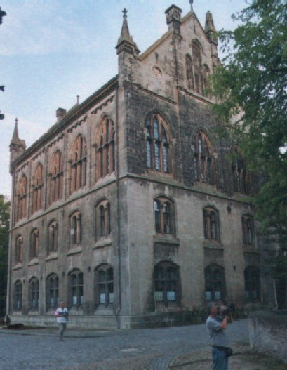 Schulpforta - Altes Schulhaus